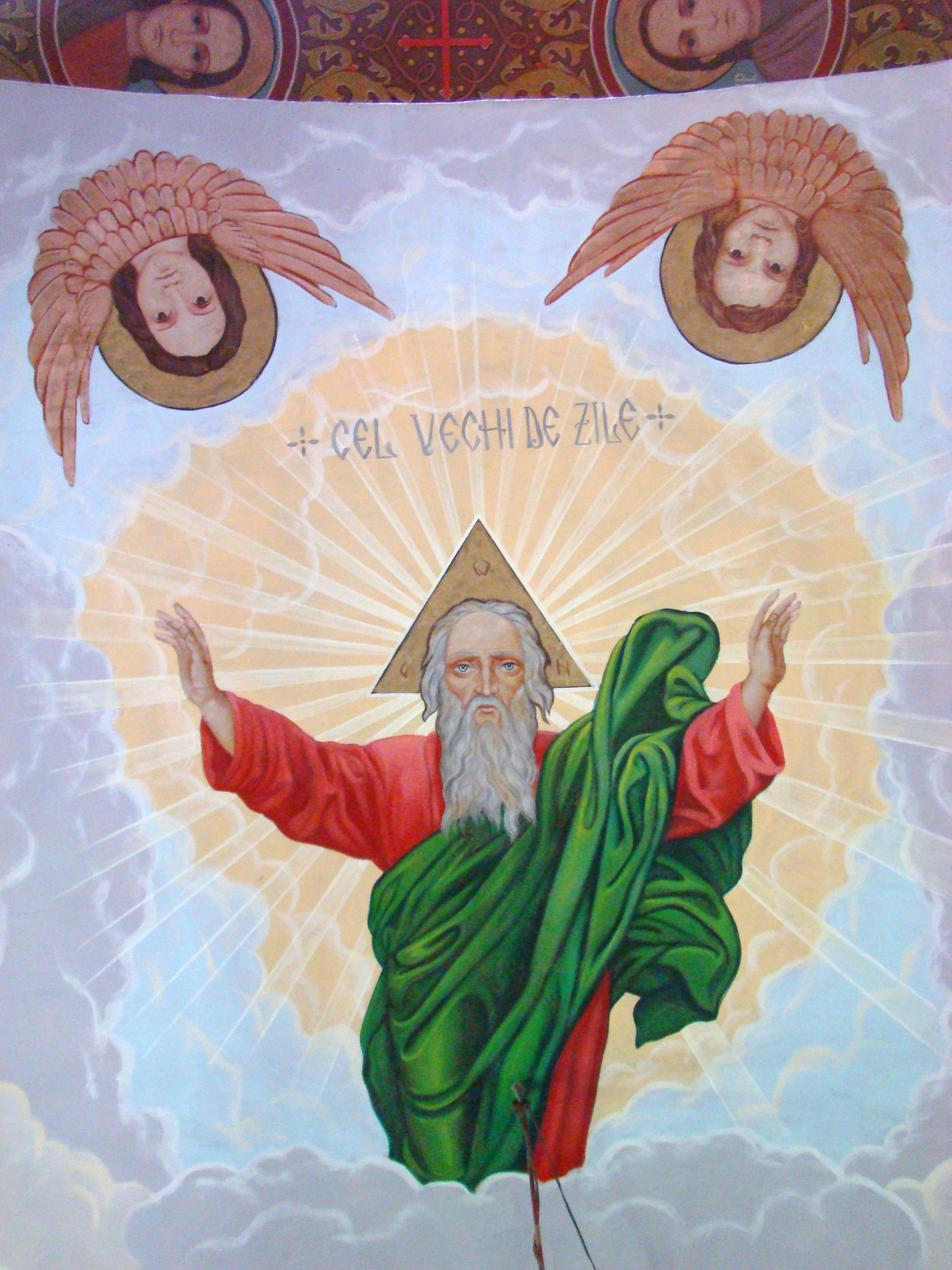 Biserica „Sfinții Arhangheli Mihail și Gavriil”, sat FEIURDENI; comuna CHINTENI, județul Cluj